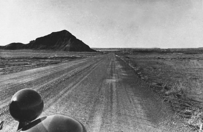 Пустыня в Аризоне. Фотография Ильи Ильфа. 1935 (Из книги "Одноэтажная Америка")